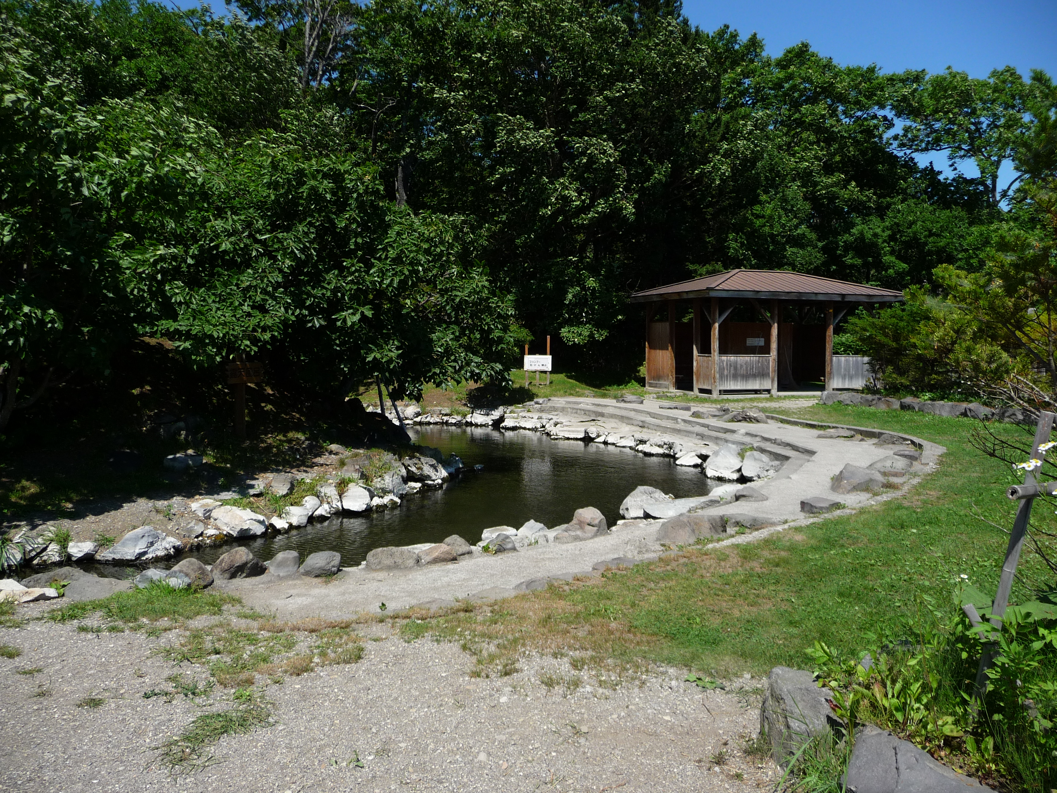 北海道弟子屈町にある、和琴半島の露天風呂。